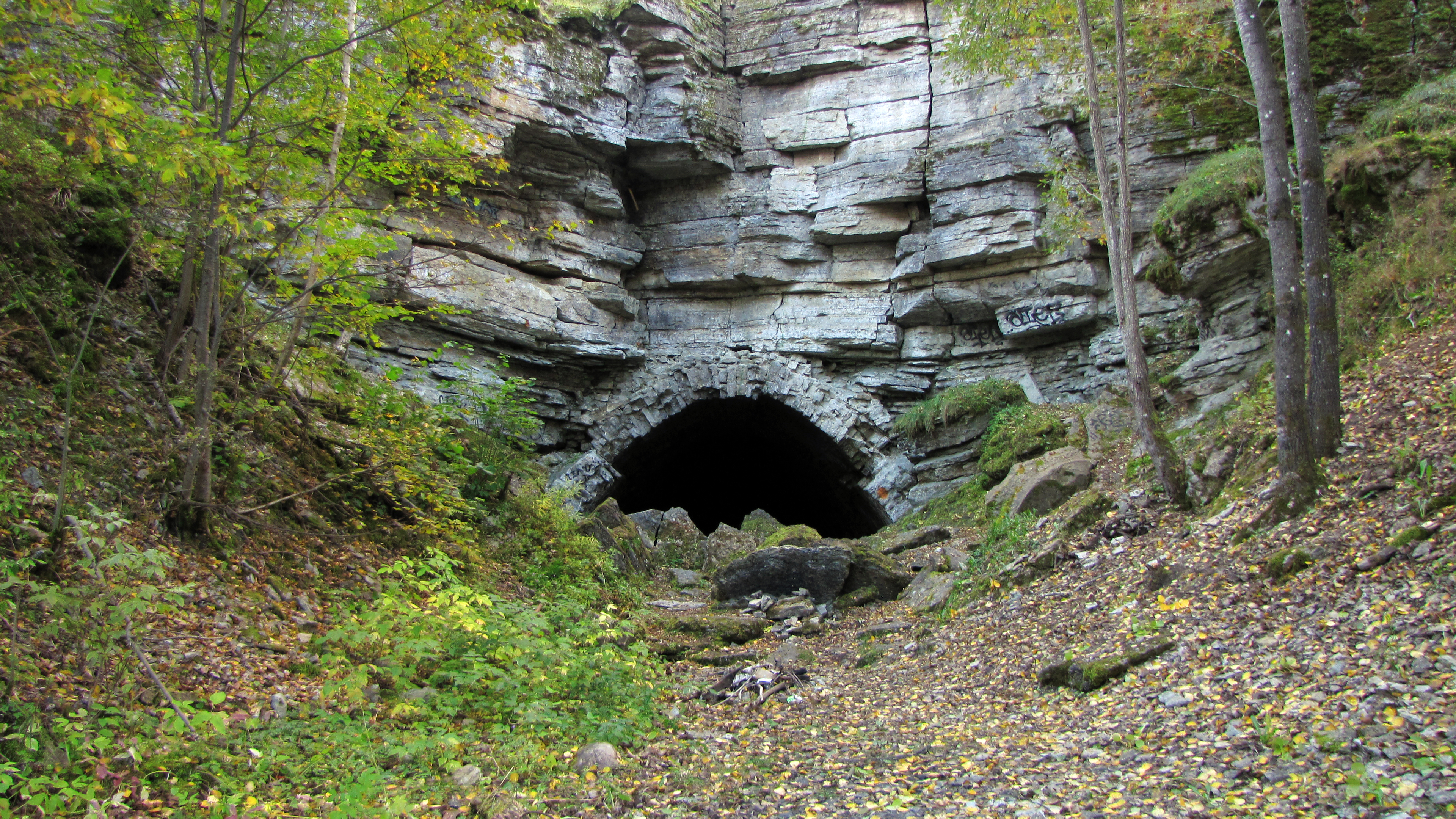 Peeter Suure merekindluse laskemoonalaod (ladu II), 1917. a, Astangu